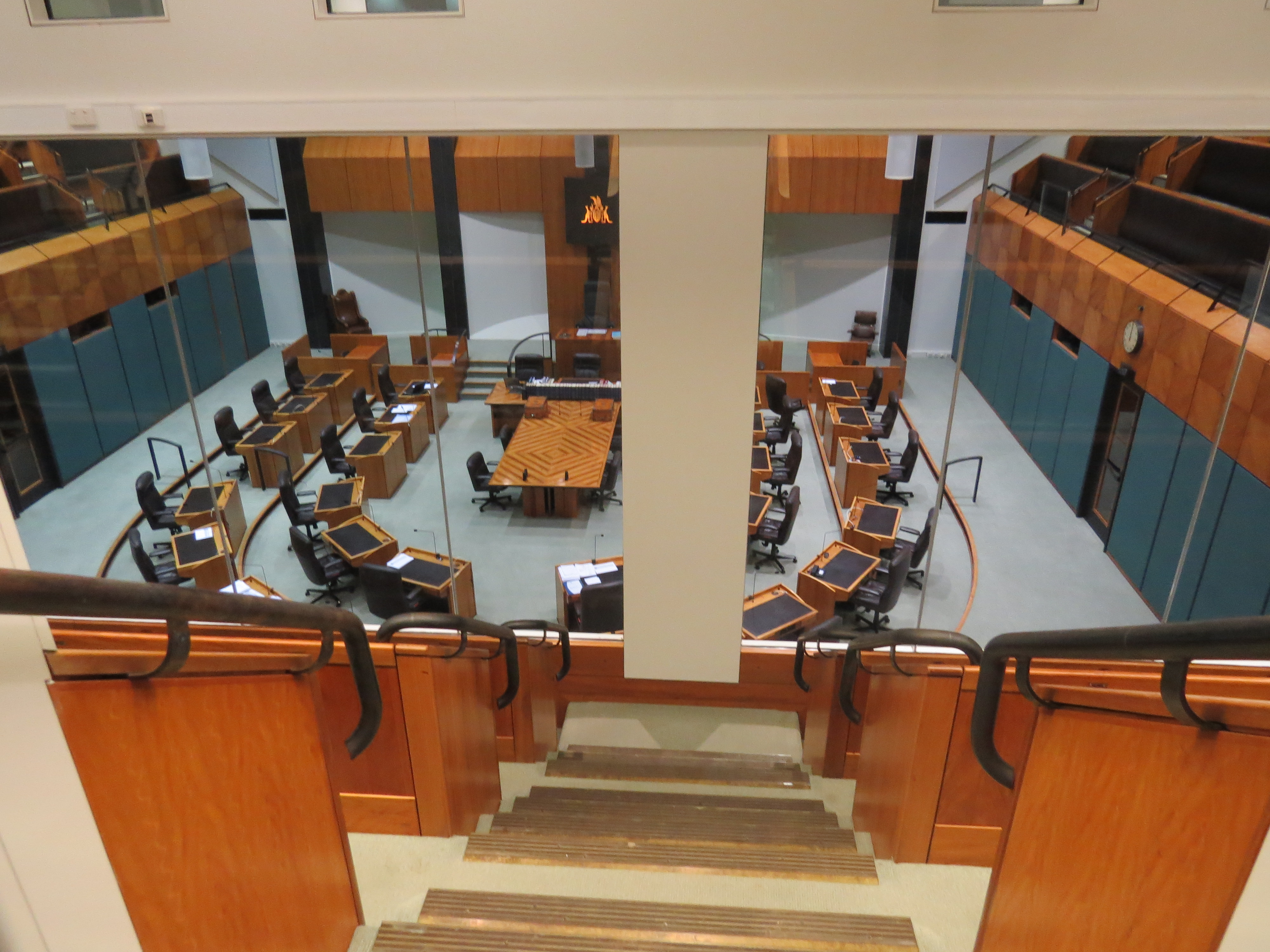 Legislative Assembly of the Northern Territory